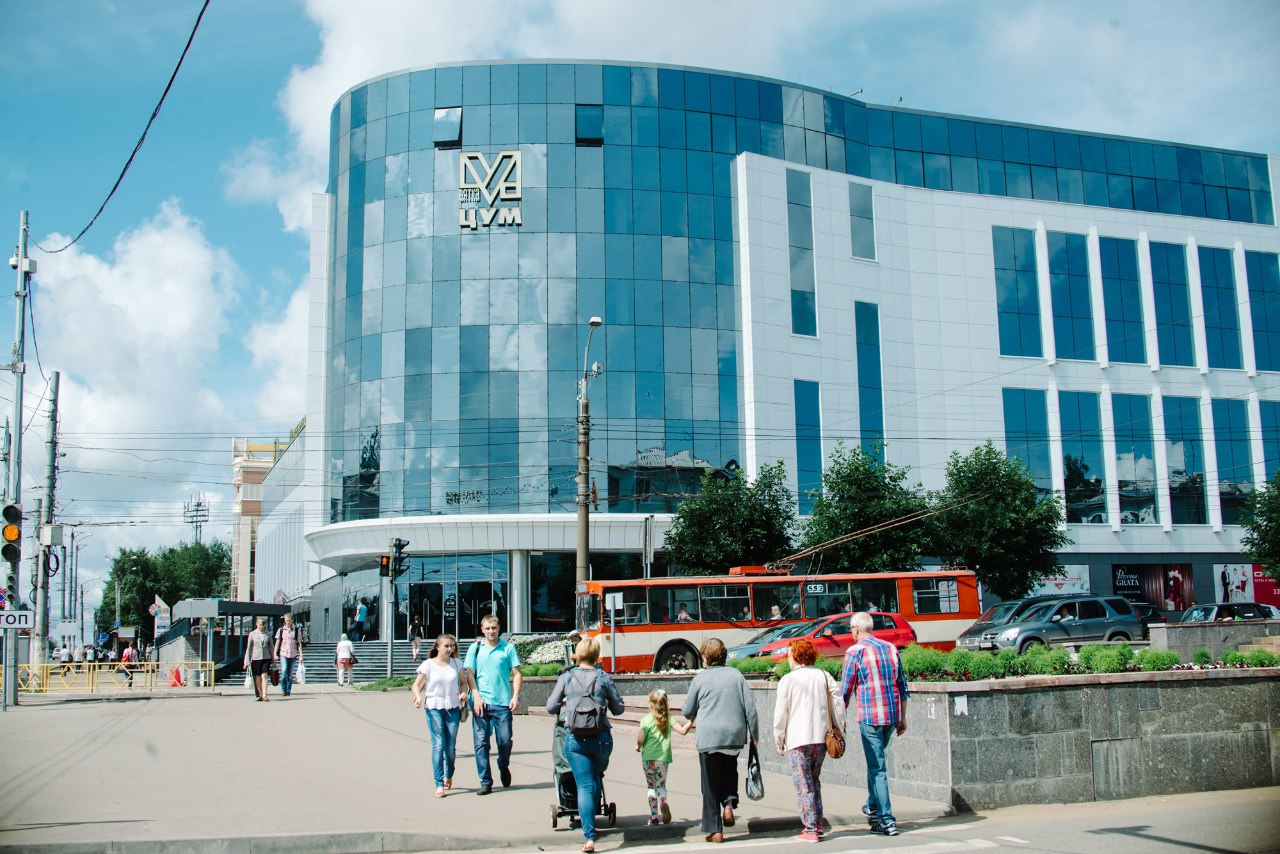 Вятка_ЦУМ, Киров